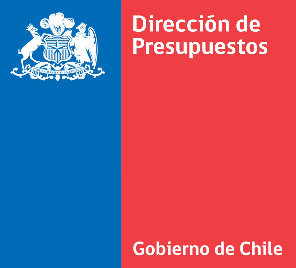 Logo Institucional de la Dirección de Presupuestos de Chile.